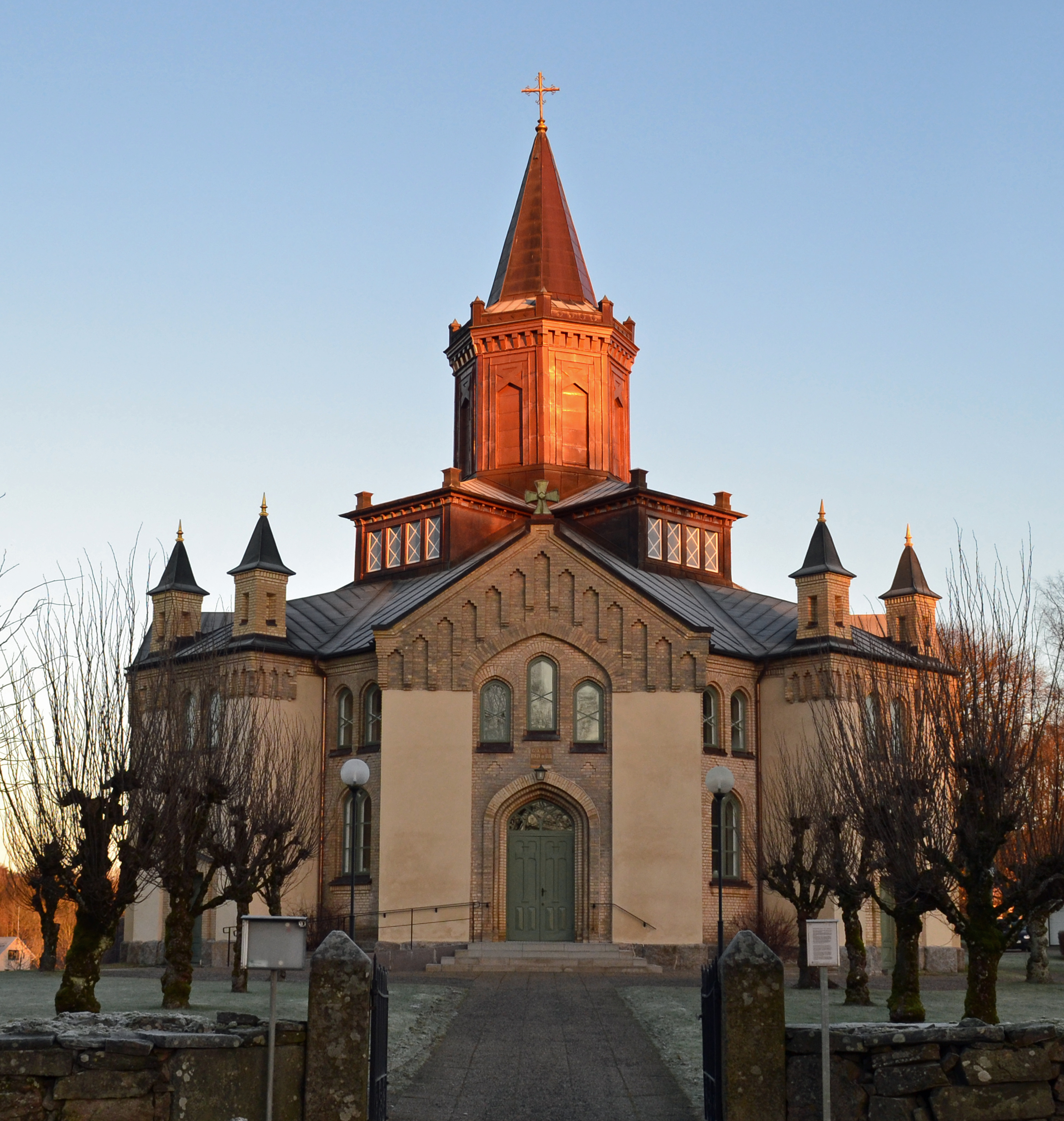 Kungsäters kyrka, uppförd 1881. Ritad av Emil Langlet.